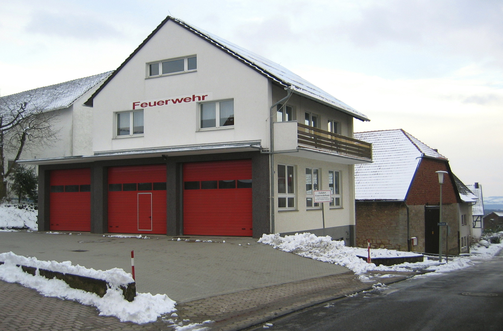 Das Feuerwehrgerätehaus der Freiwilligen Feuerwehr Bad Driburg Löschgruppe Dringenberg in Dringenberg, Bad Driburg, Deutschland.